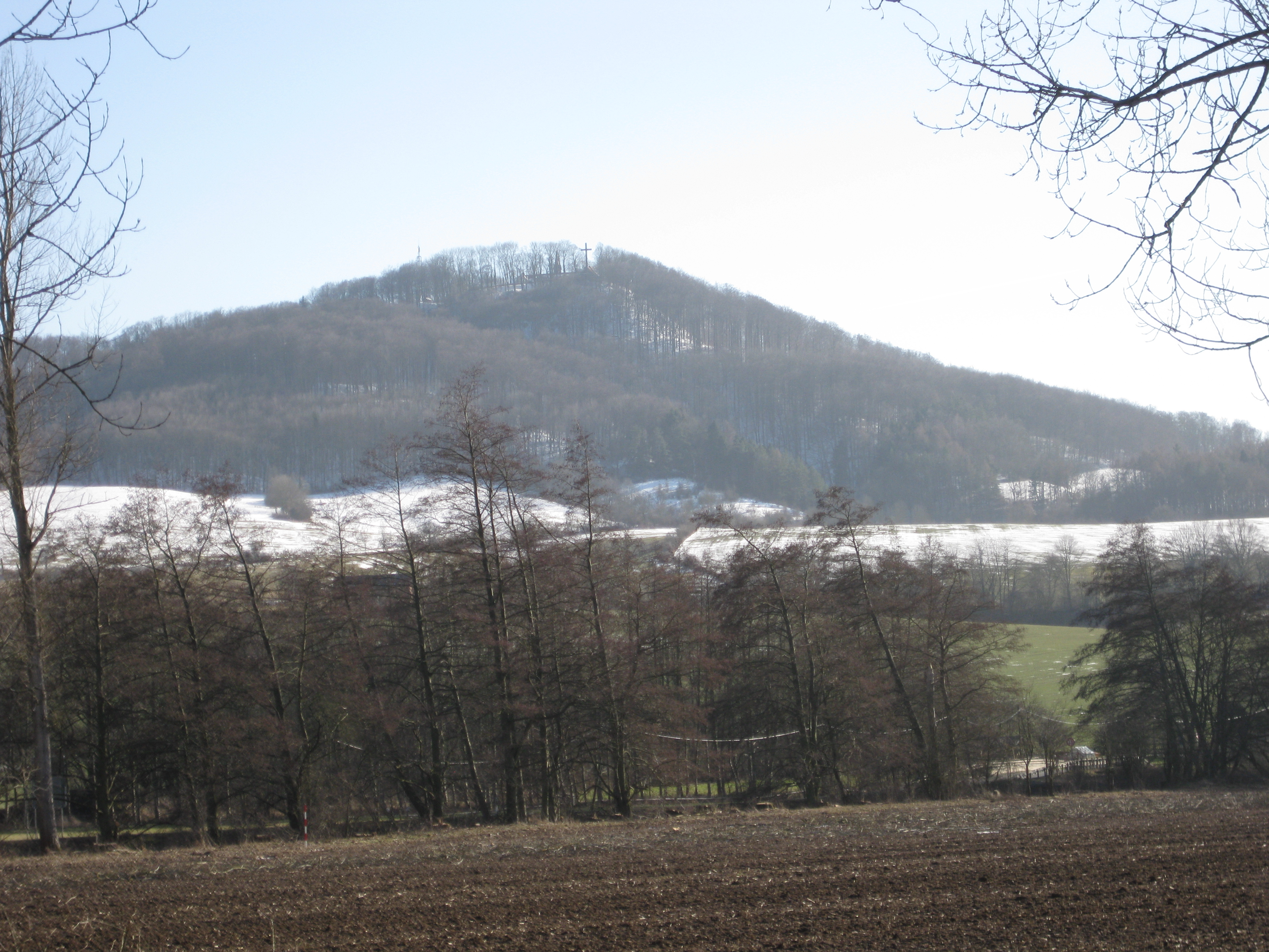 Der Hülfensberg von Nordosten gesehen